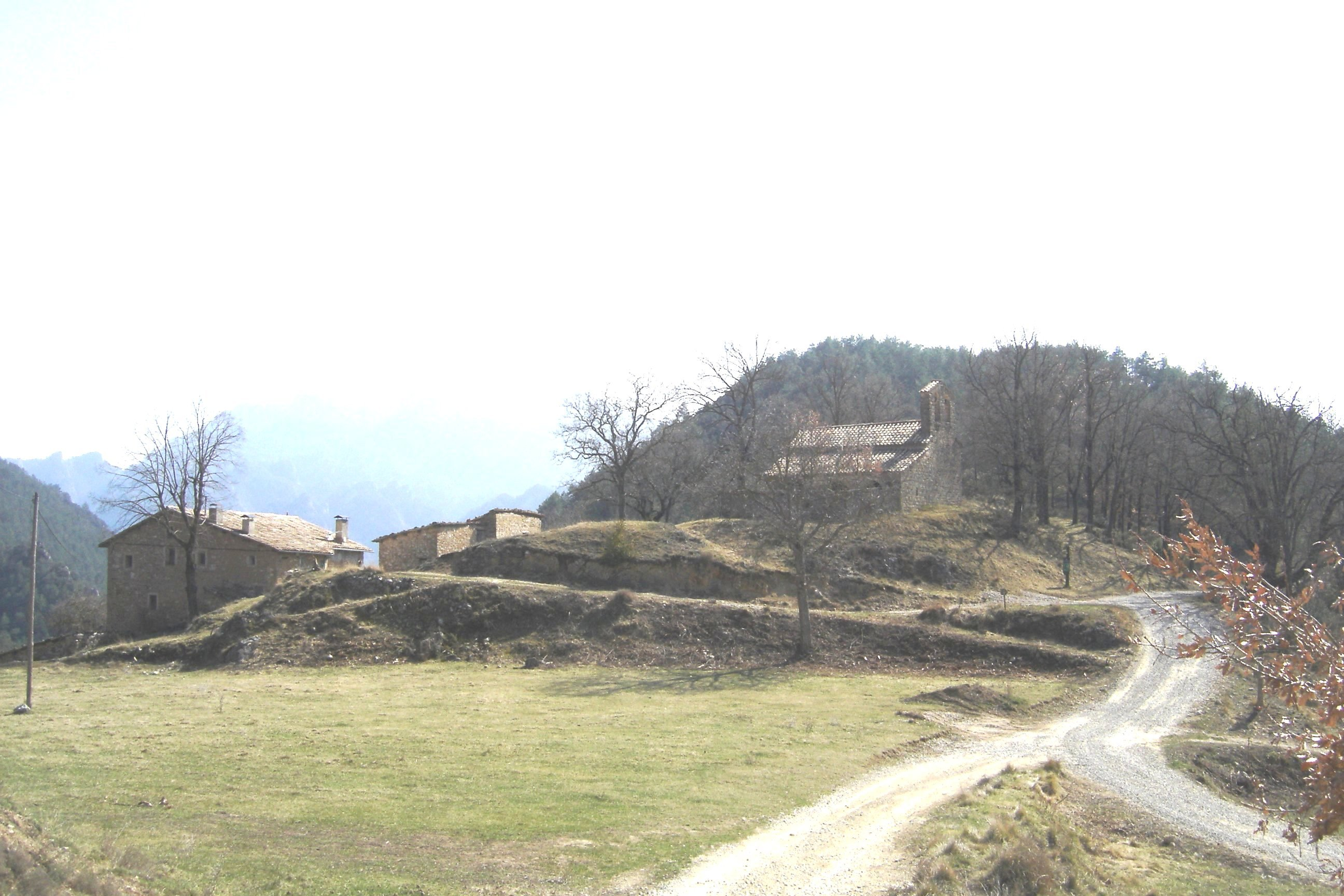 L'ermita de Sant Lleïr de Casabella, al municipi de La Coma i la Pedra, a la Vall de Lord (Solsonès) des del costat nord-oriental. Darrere l'ermita, el turó de Sant Lleïr. A l'esquerra, la masia de Cal Camats, dita també Casa Clot o Cal Calat